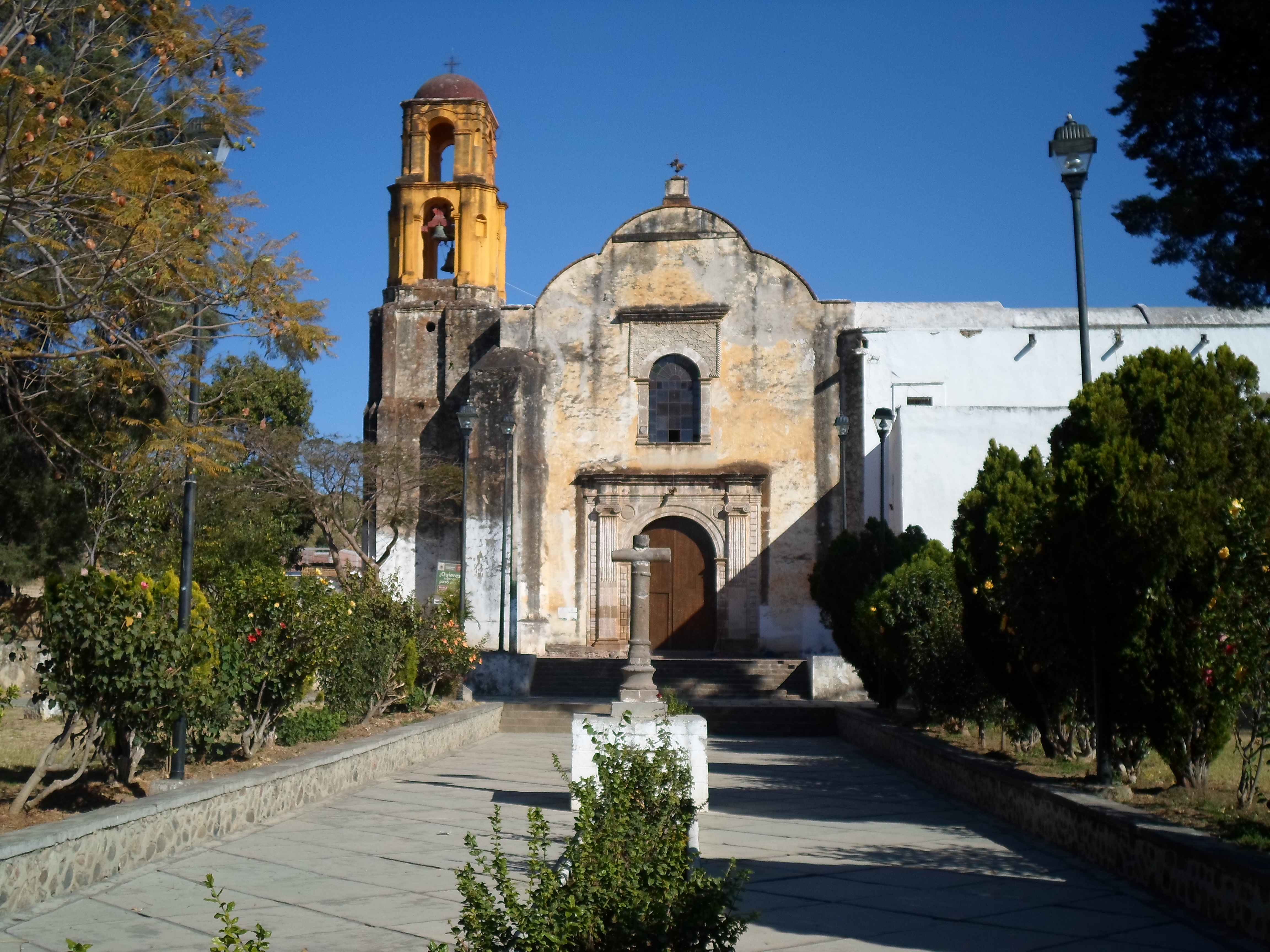 Vista frontal del ex convento